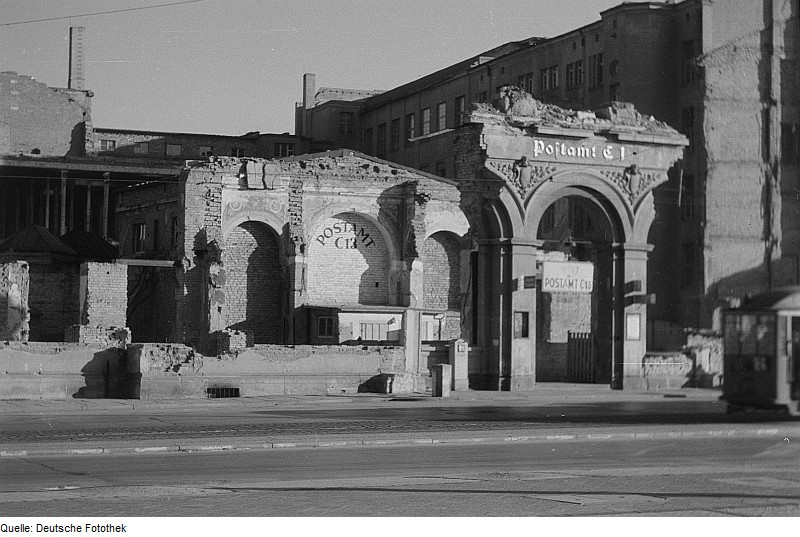 Original image description from the Deutsche Fotothek Ruine des Hauptpostamts an der Ostseite des Augustusplatzes